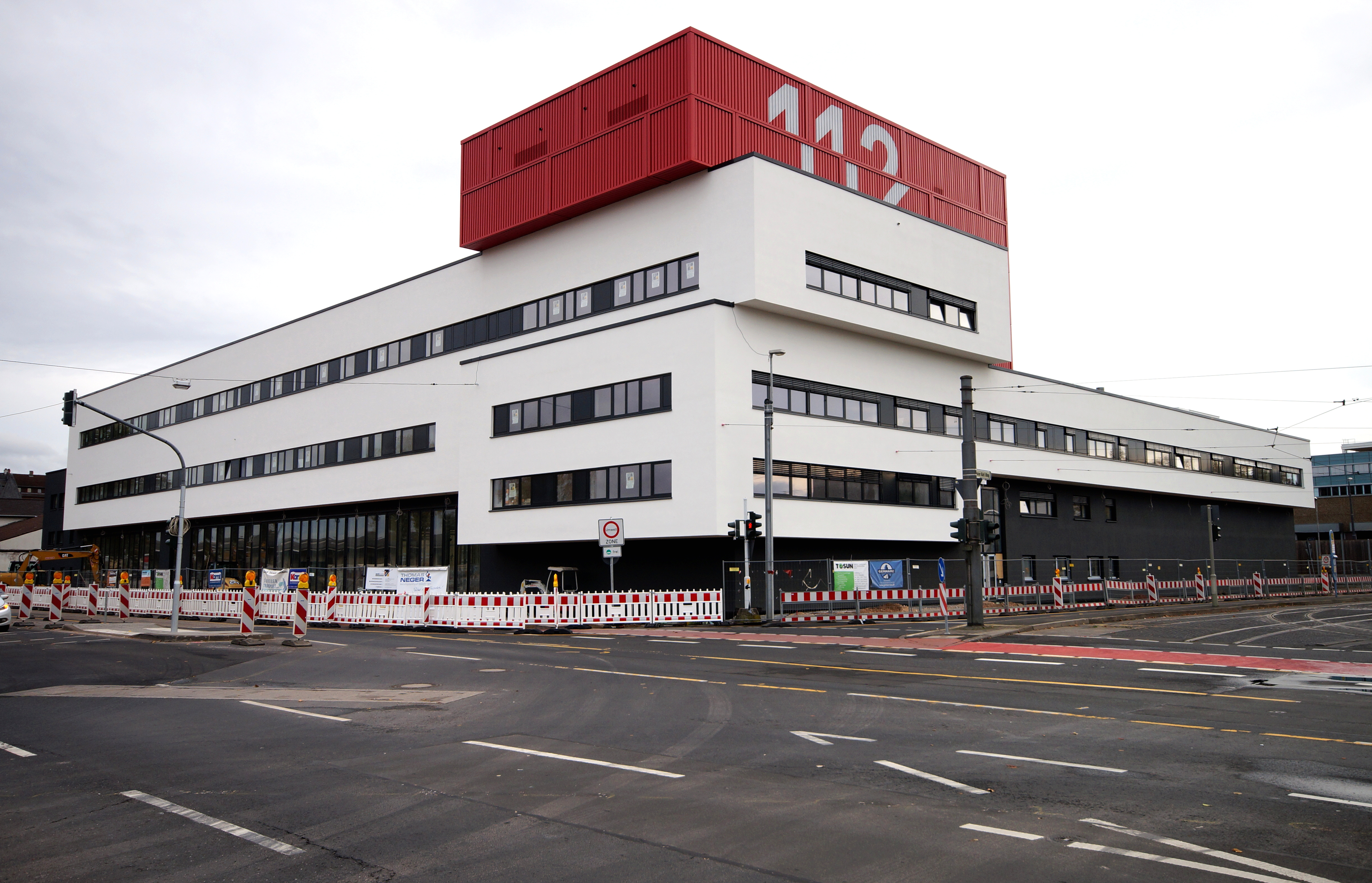 Die neue Feuerwache 2 der Berufsfeuerwehr Mainz in der Rheinallee in Mainz-Neustadt.